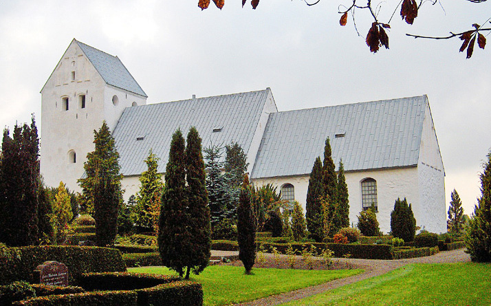 fra sydøst